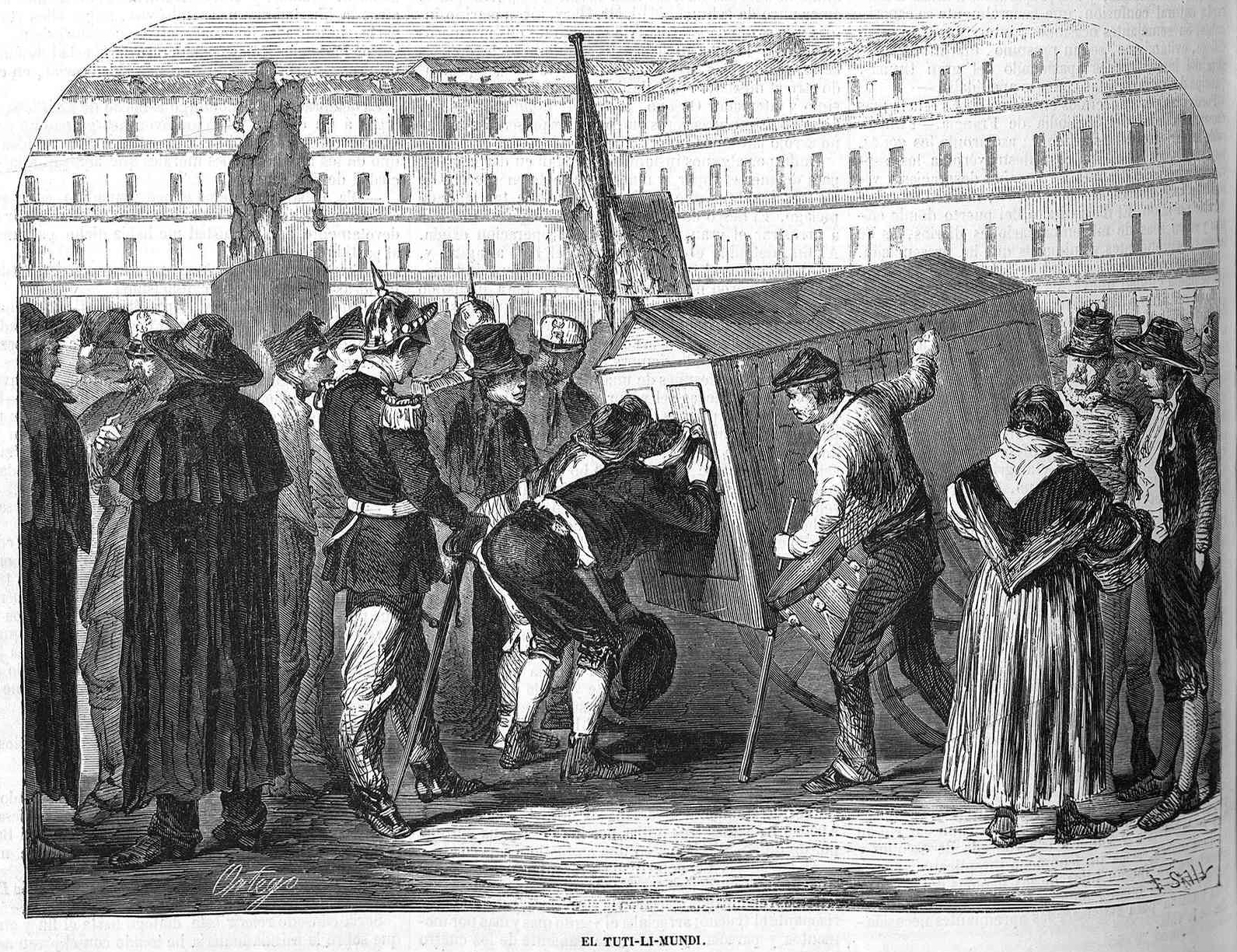 Tuti-li-mundi, en la revista española El Museo Universal.